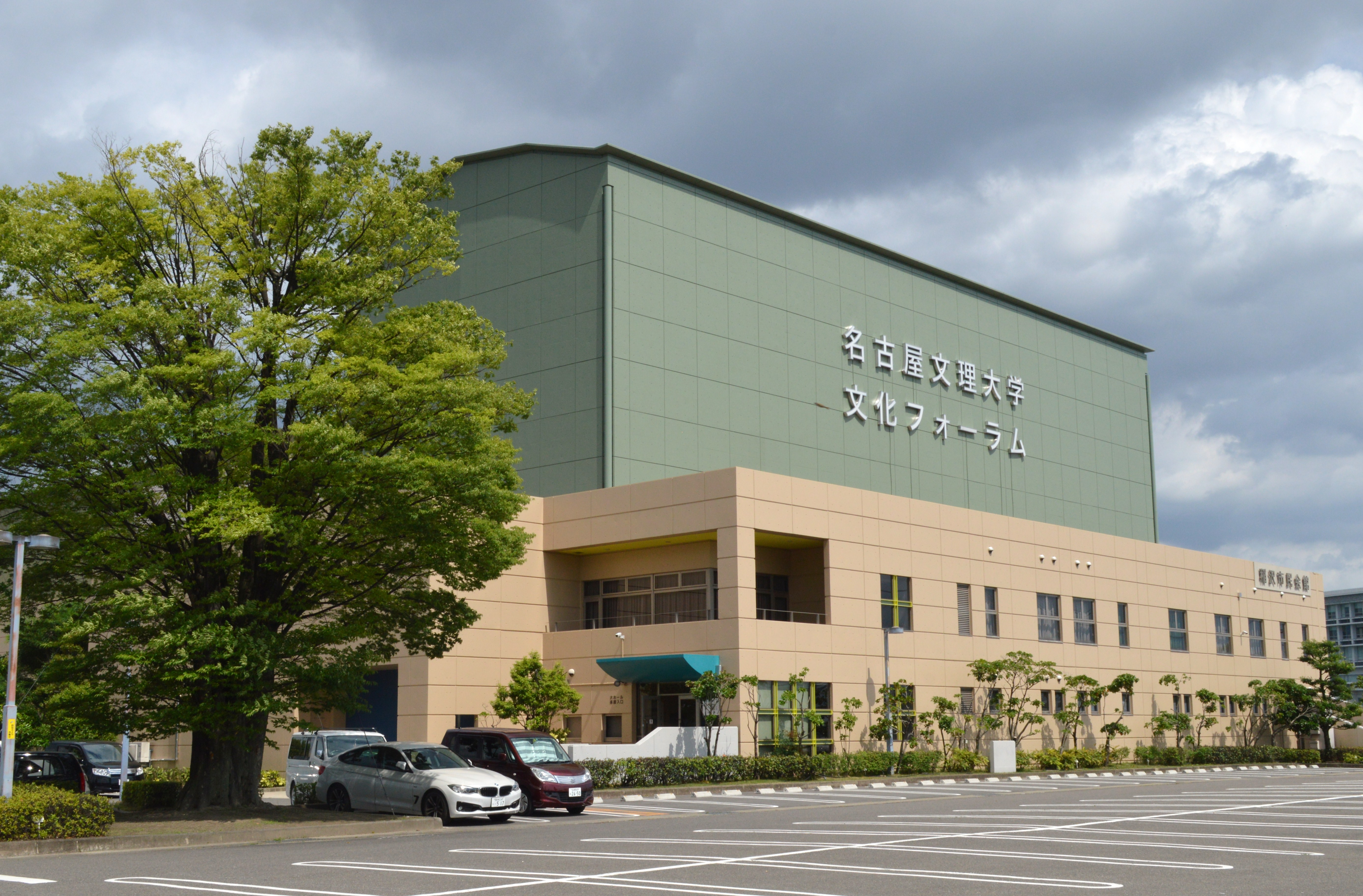 稲沢市民会館（命名権名称 : 名古屋文理大学文化フォーラム）